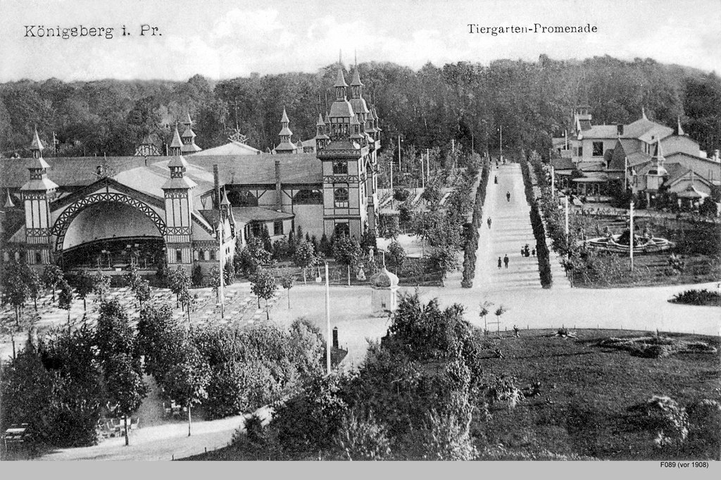 Zoo in Königsberg